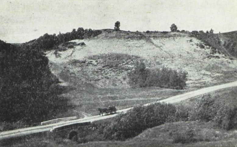 Pada linnamägi